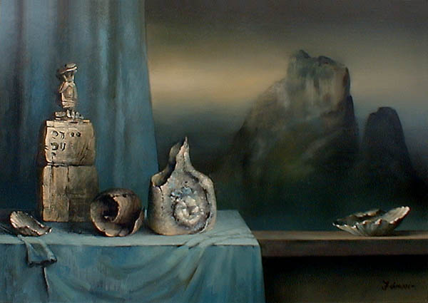 Jánosi Katalin (1951. november 2. -) magyar festő- és gobelinművész alkotása: Távol a világtól, 1996, olajfestmény, 70x100 cm